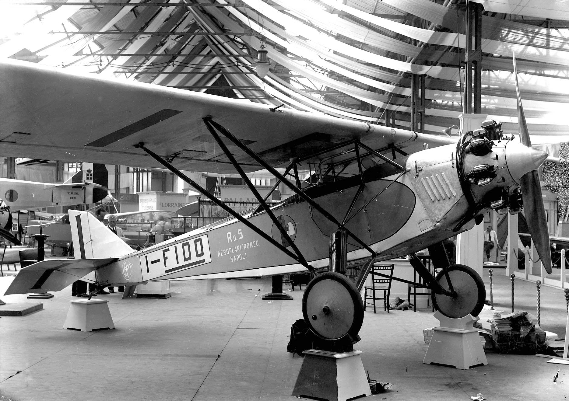 IMAM Ro. 5 (Romeo Ro. 5)